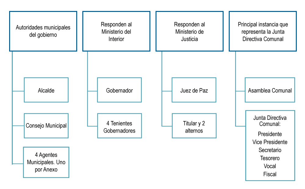 Organigrama de autoridades distritales y comunales de Sacsamarca.